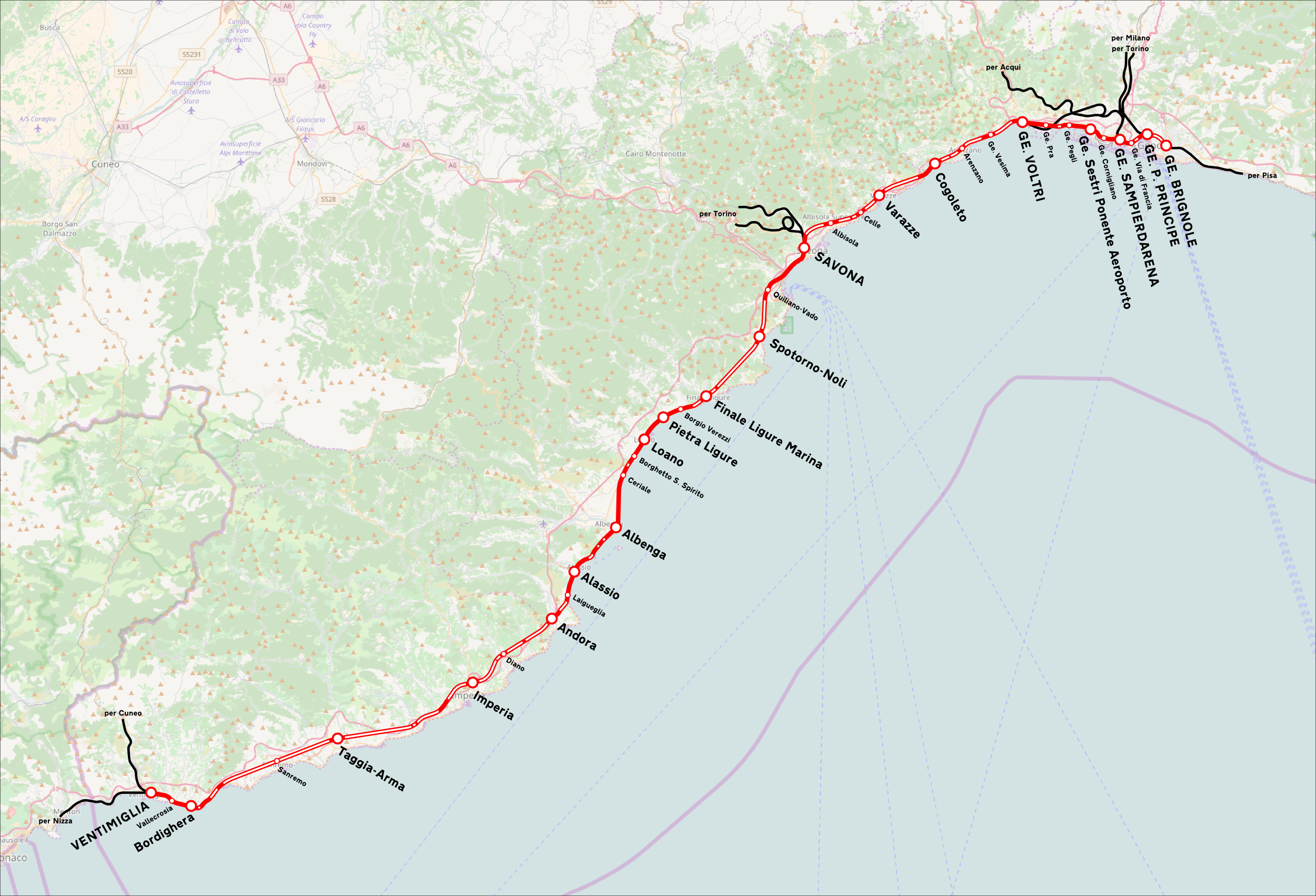 Mappa della ferrovia Genova-Ventimiglia. This map may be incomplete, and may contain errors. Don't rely solely on it for navigation.